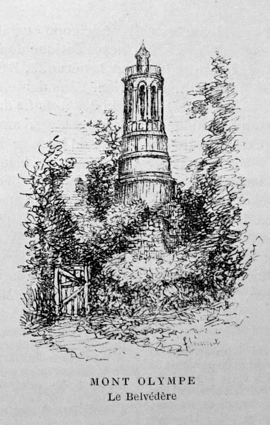 publié vers 1900.